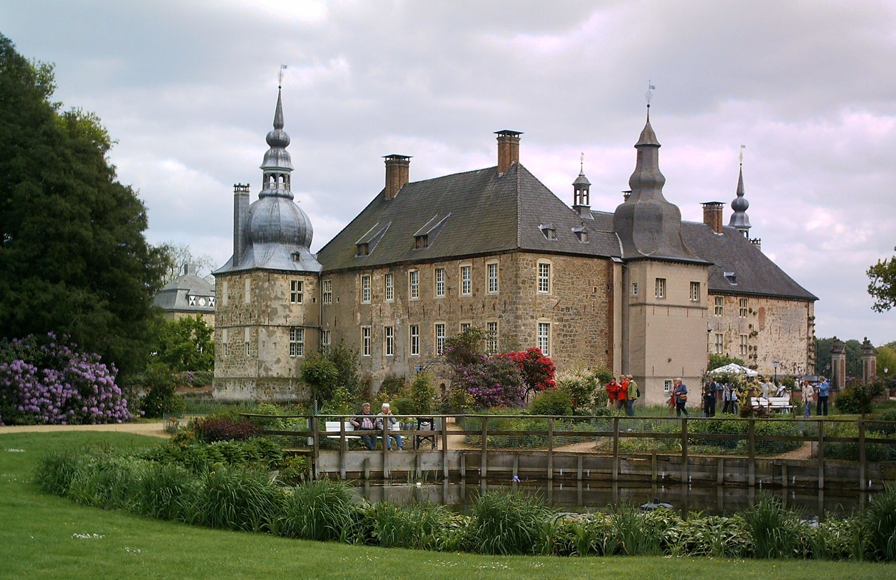 Château "Schloss Lembeck" near Dorsten, Germany.